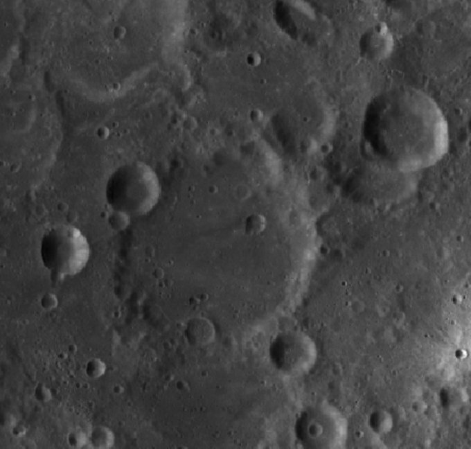 Cráter lunar Erro. (Imagen LROC)